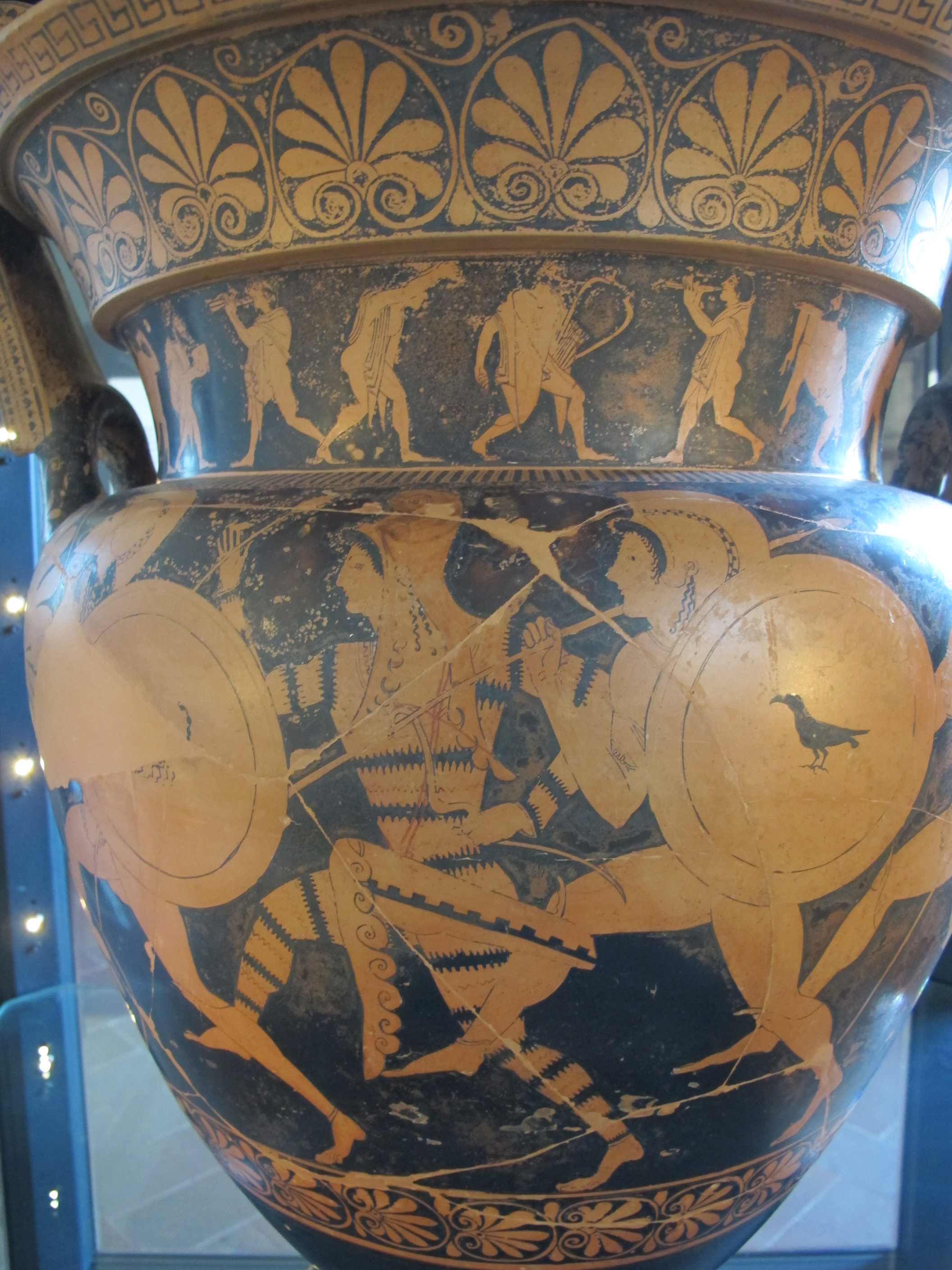 Museo Archeologico Nazionale G.C.Mecenate - MIBAC This is a photo of a monument which is part of cultural heritage of Italy.